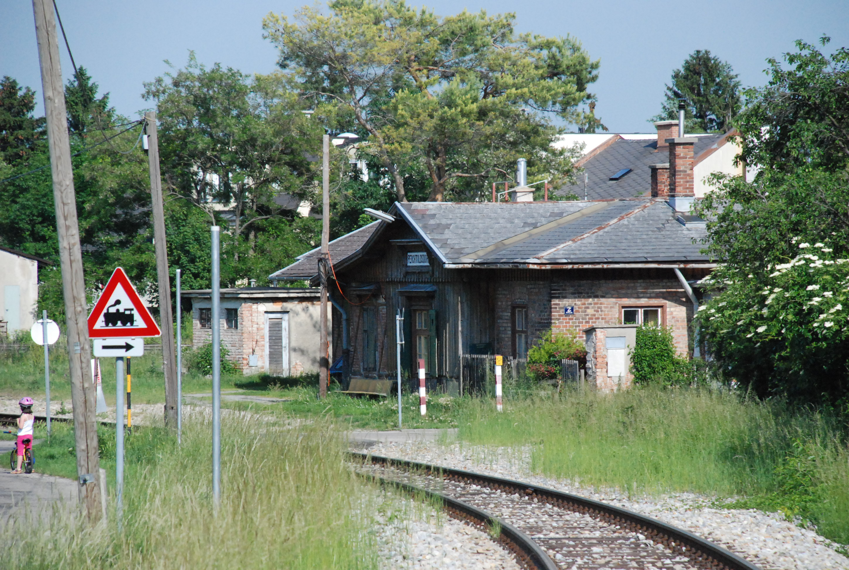 Bahnhof Perchtoldsdorf an der Kaltenleutgebener Bahn ab Westeinfahrt, Standort frühere Einfahrtsweiche Richtung Rodaun